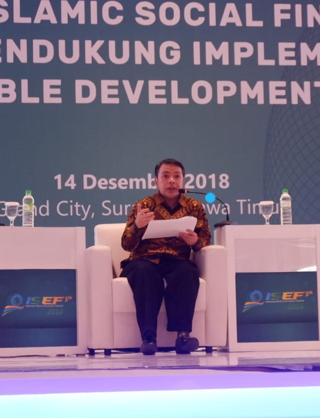 Acara Indonesia Shari'ah Economic Festival (ISEF) di Surabaya